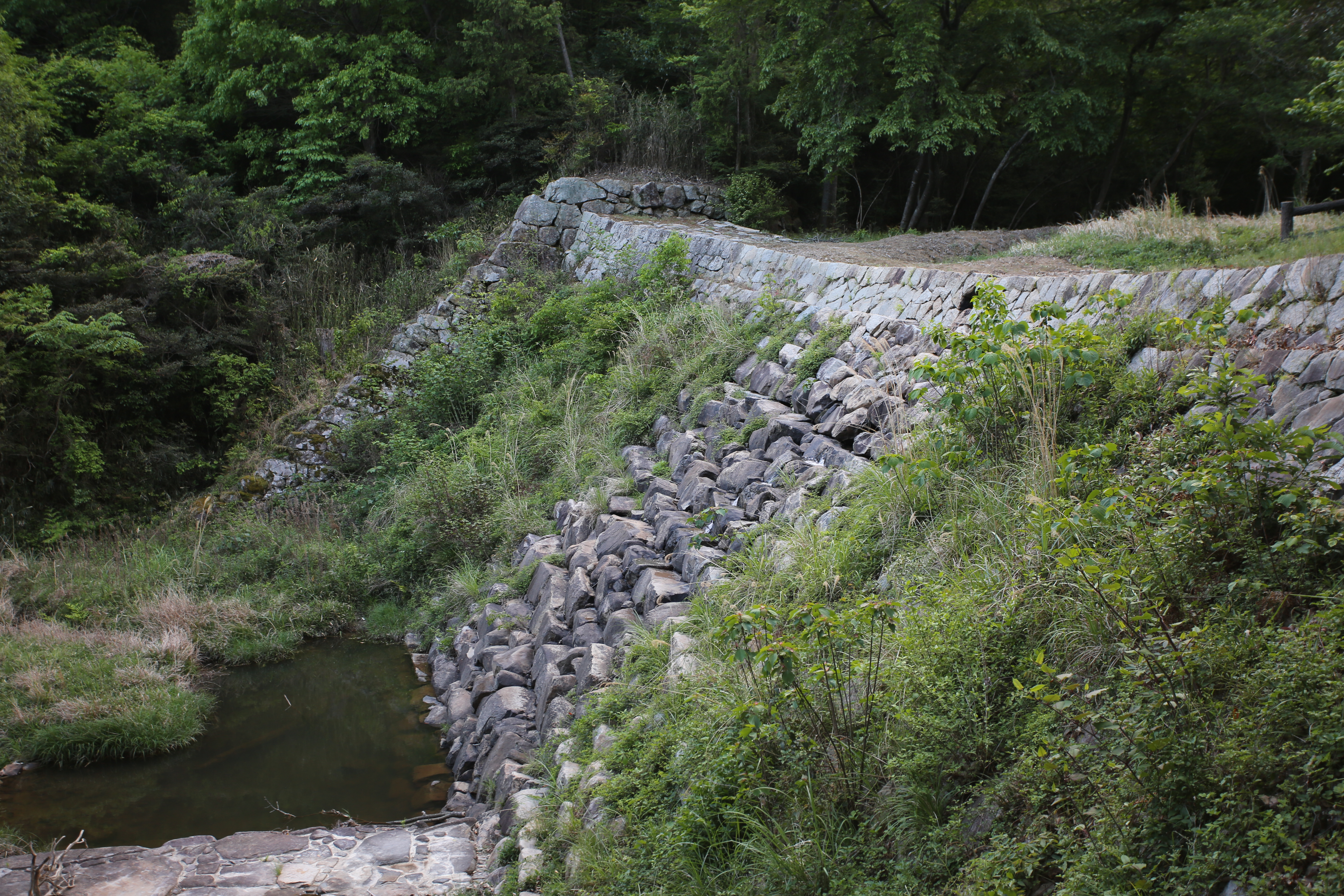 広島県福山市津之郷町の本谷川砂留。江戸時代中期の石積砂防ダム。